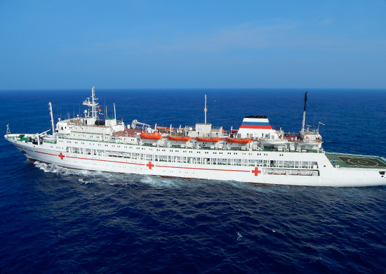 Госпитальное судно «Иртыш» Тихоокеанского флота